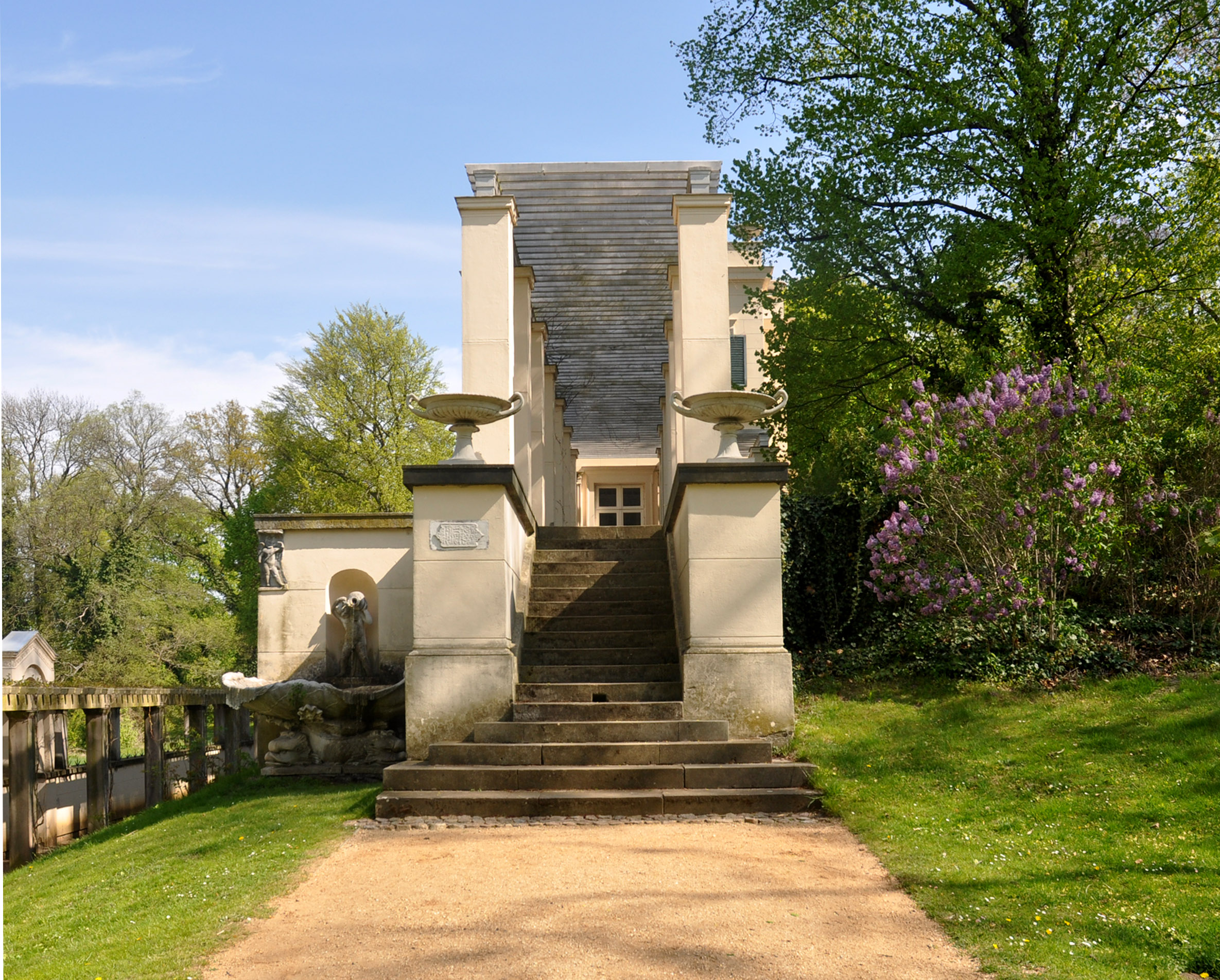 Park Klein-Glienicke, Südtreppe des Casinos